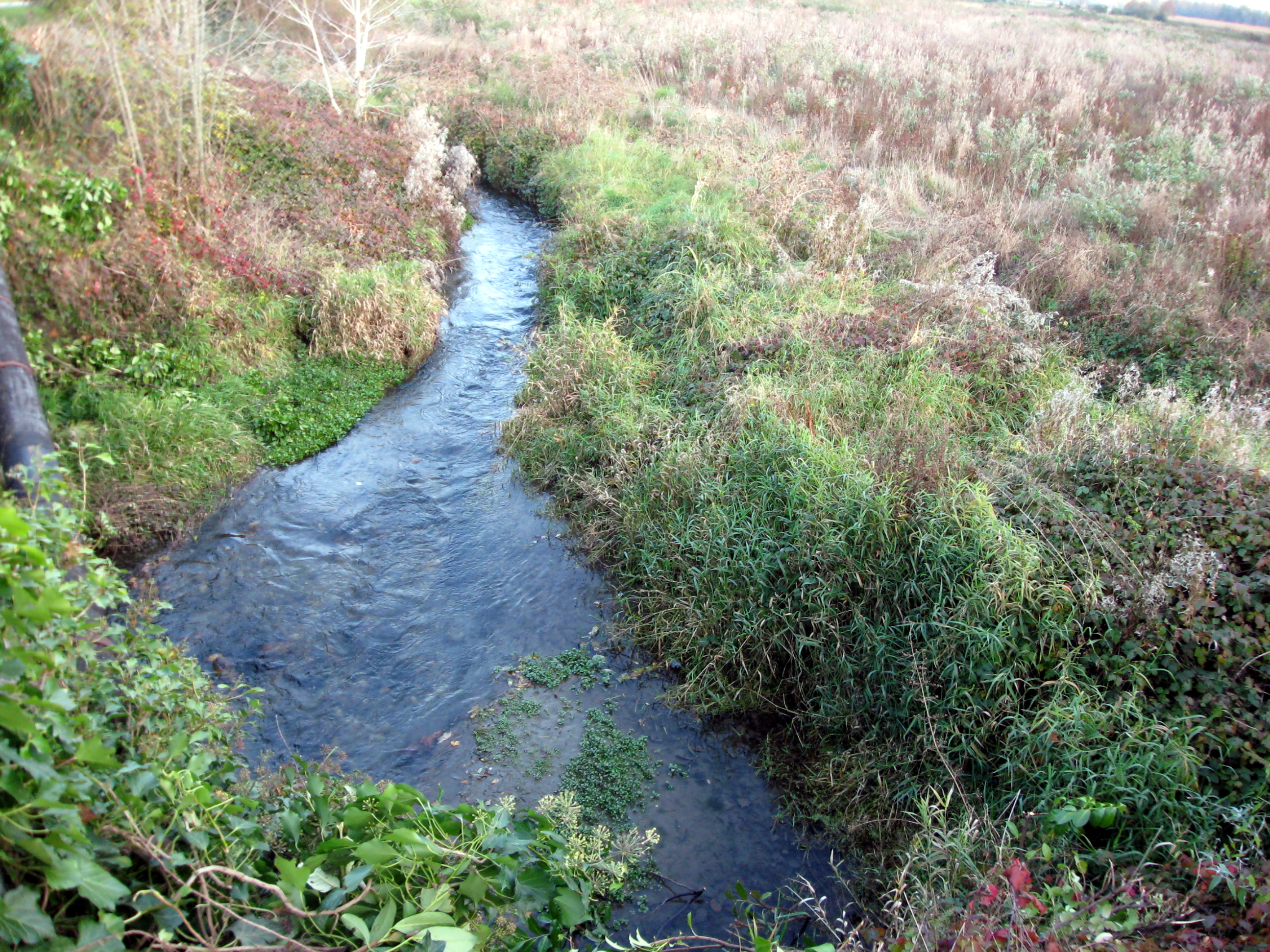 Canal dévié du gave de Pau alimentant l'usine Turbomeca de Bordes (Pyrénées-Atlantiques) (Pyrénées).